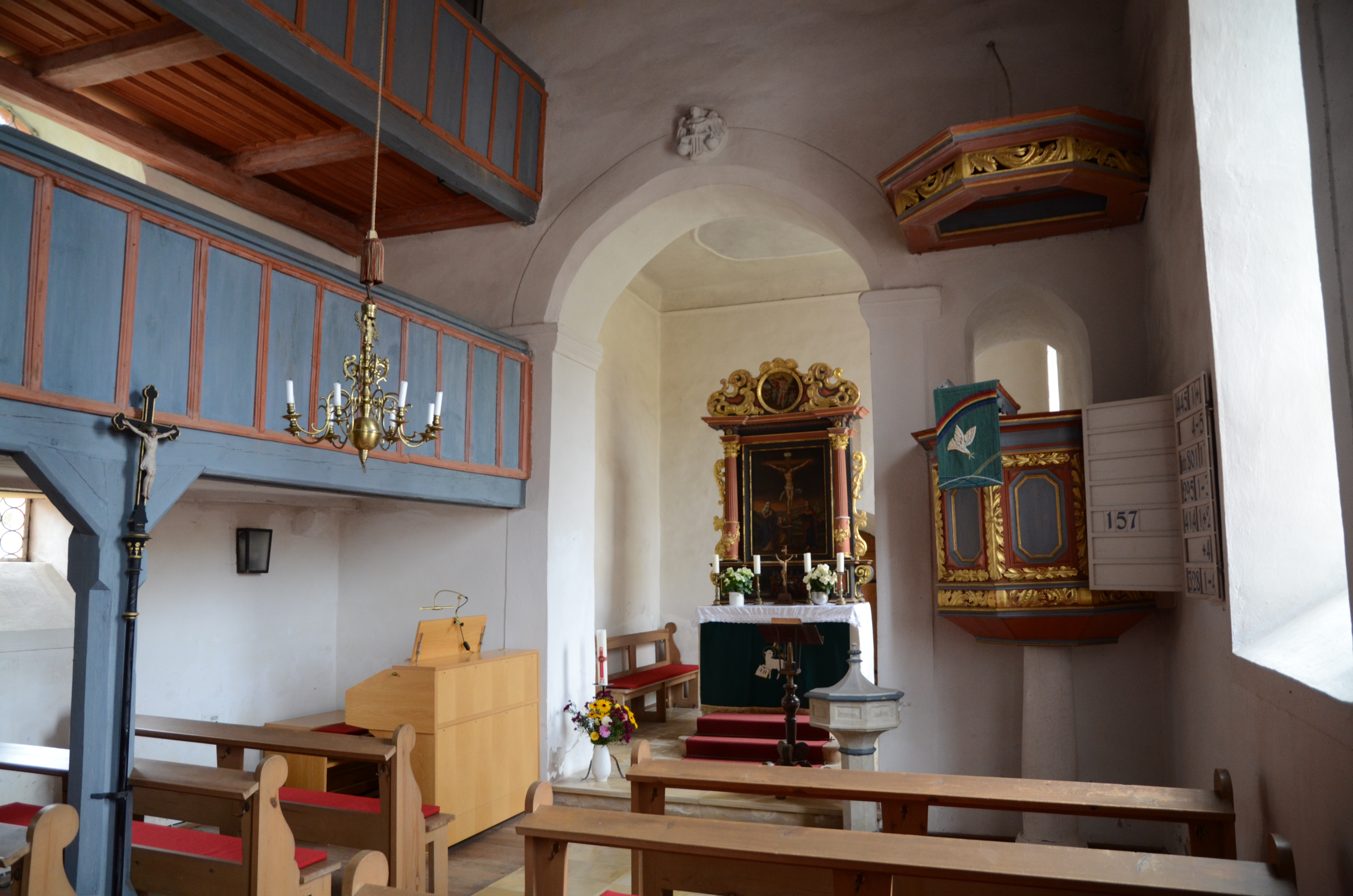 Hohnsberg, St. Michael